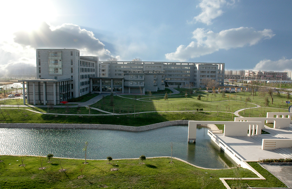 天津师范大学主校区